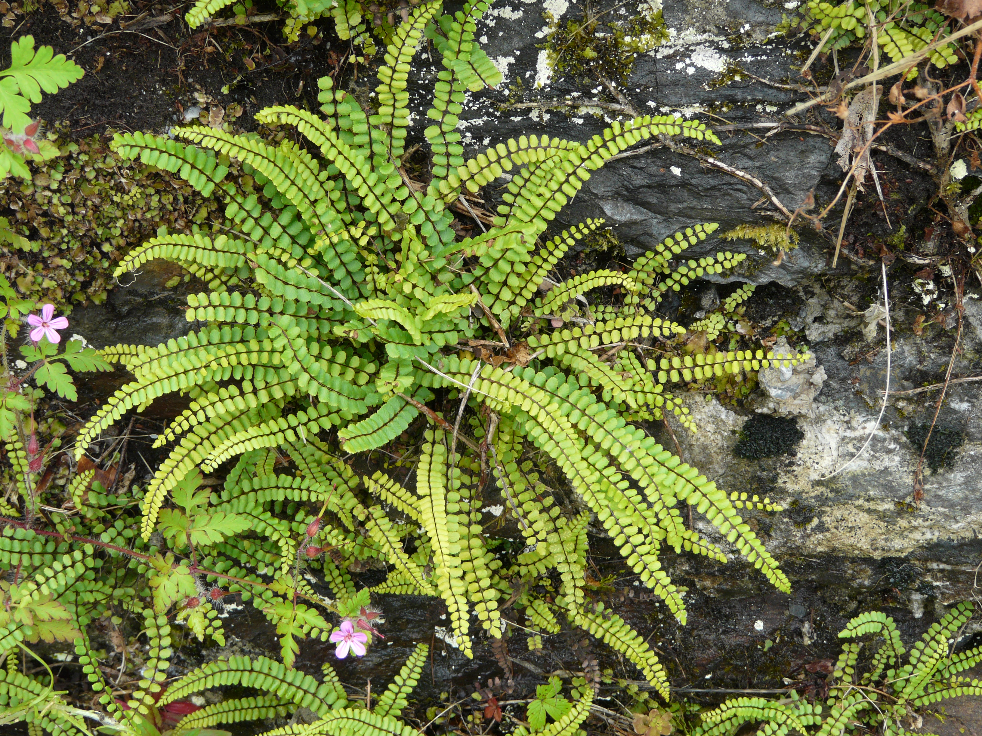 Capillaire des murailles (Asplenium trichomanes) sur un muret vertical, Canejan Val d'Aran, Espagne.